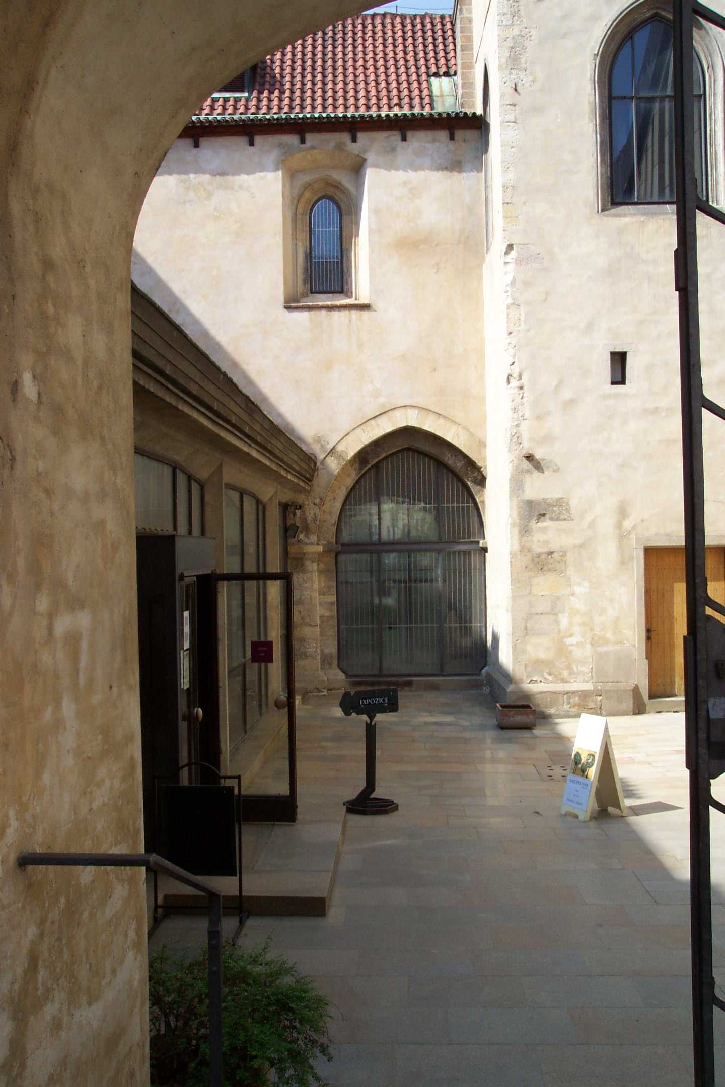 Agnes monastery in Prague - Anežský klášter v Praze